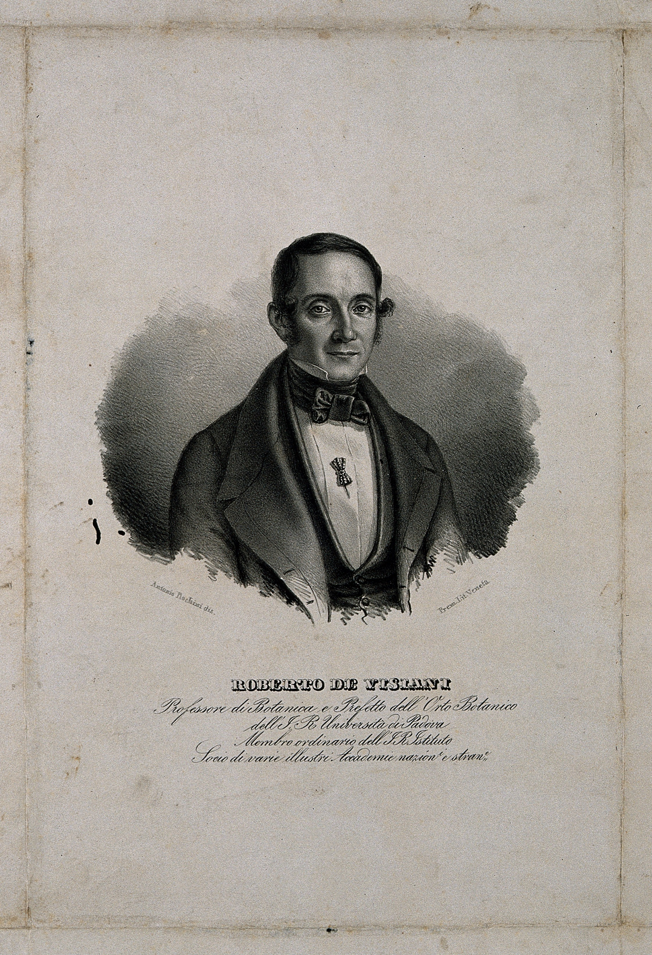 Genre/Technique: Portrait prints. Lithographs. Subject name: De Visiani, Roberto, fl. ca. 1830-1835.